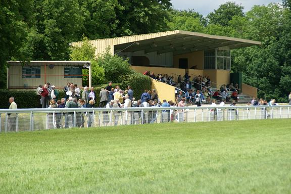 Tribune